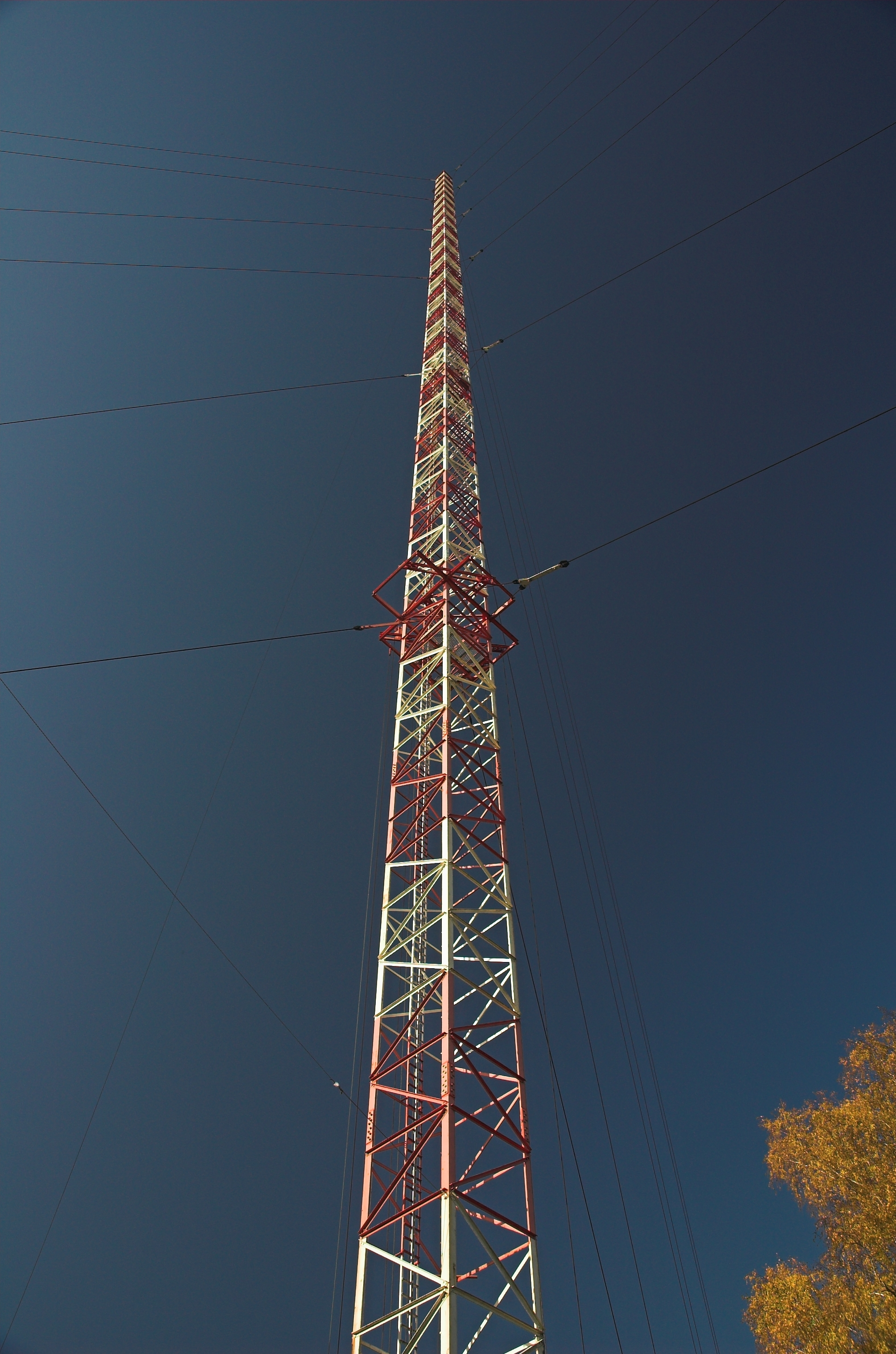 Sendemast auf dem Funkerberg Königs Wusterhausen. Höhe: 210 m